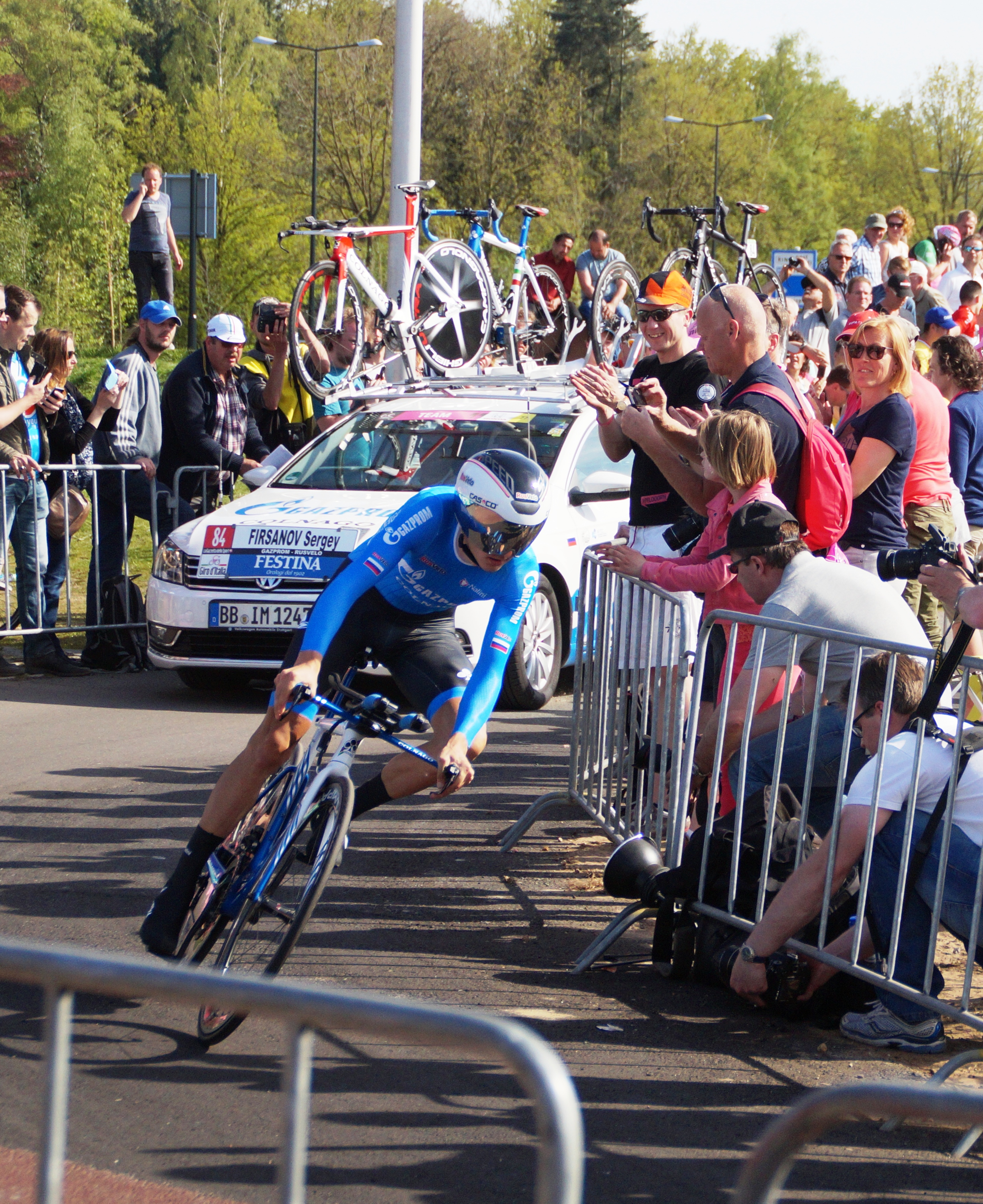 DSC05041 Sergey Visanov